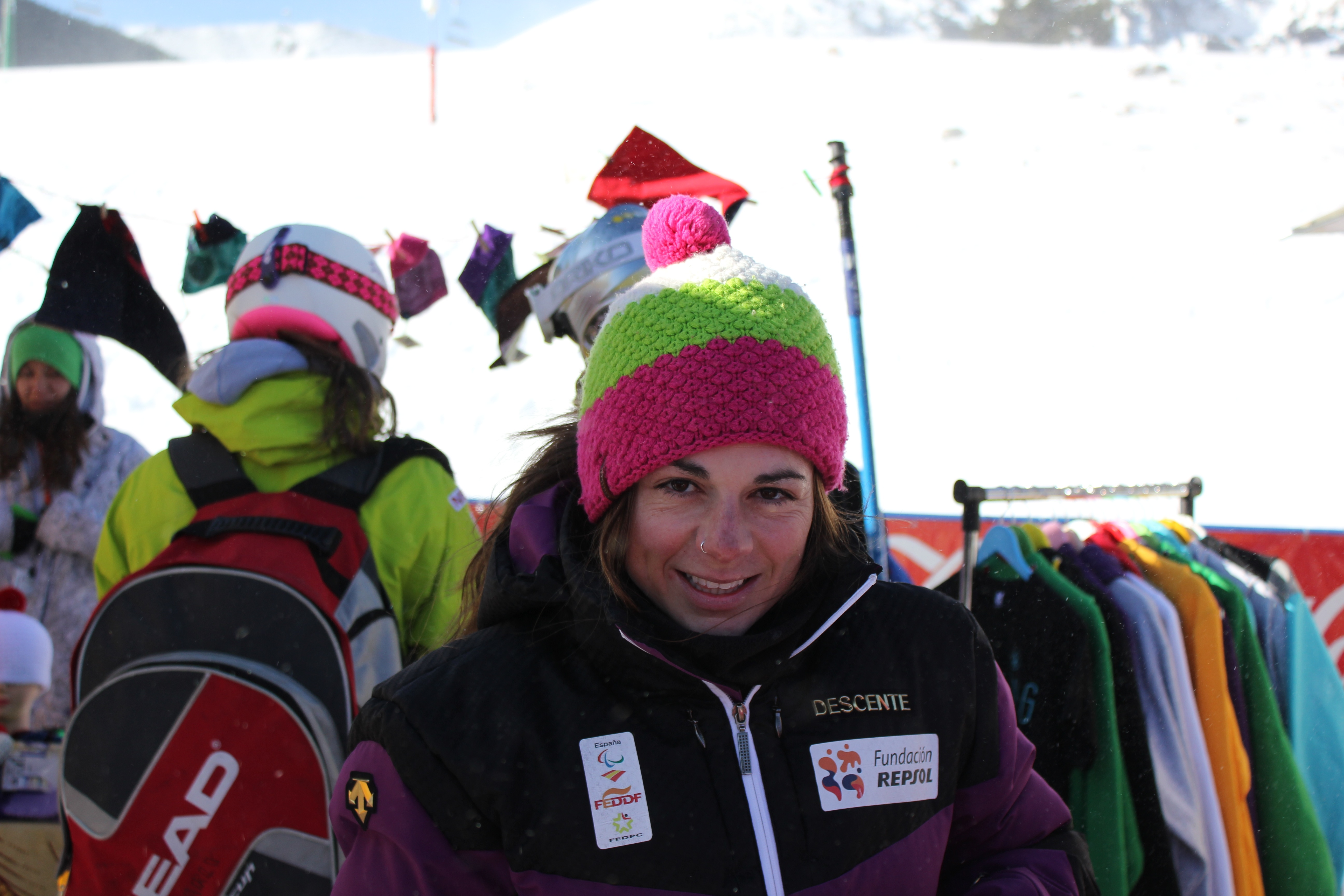 La española Úrsula Pueyo, esquiadora alpina paralímpica, en el Campeonato del Mundo IPC de esquí alpino 2013 celebrado en La Molina, España.